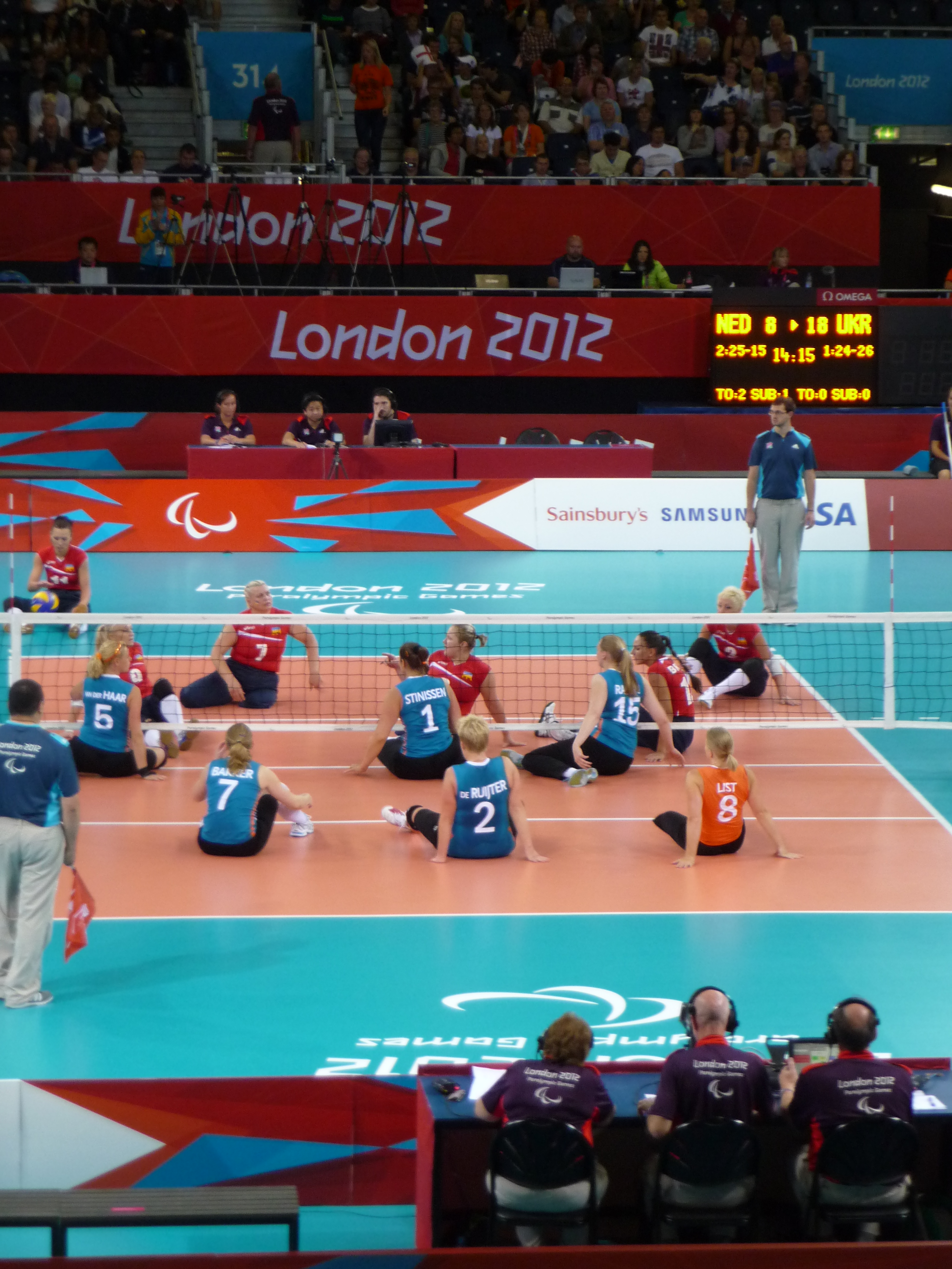 Zitvolleybal wedstrijd Nederland Dames Zitvolleybal Team tijdens de Paralympische Spelen Londen 2012